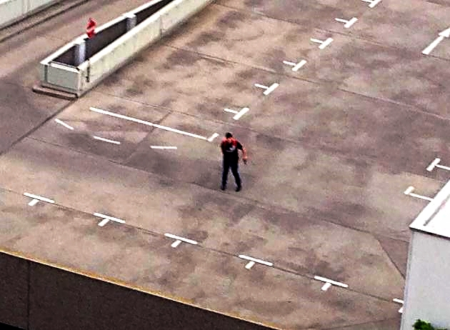 Amok-Läufer mit Glock-Pistole in linker Hand auf OEZ-Parkdeck in München